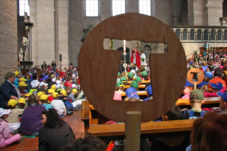 KITA-Tag der Heilig-Rock-Tage 2010